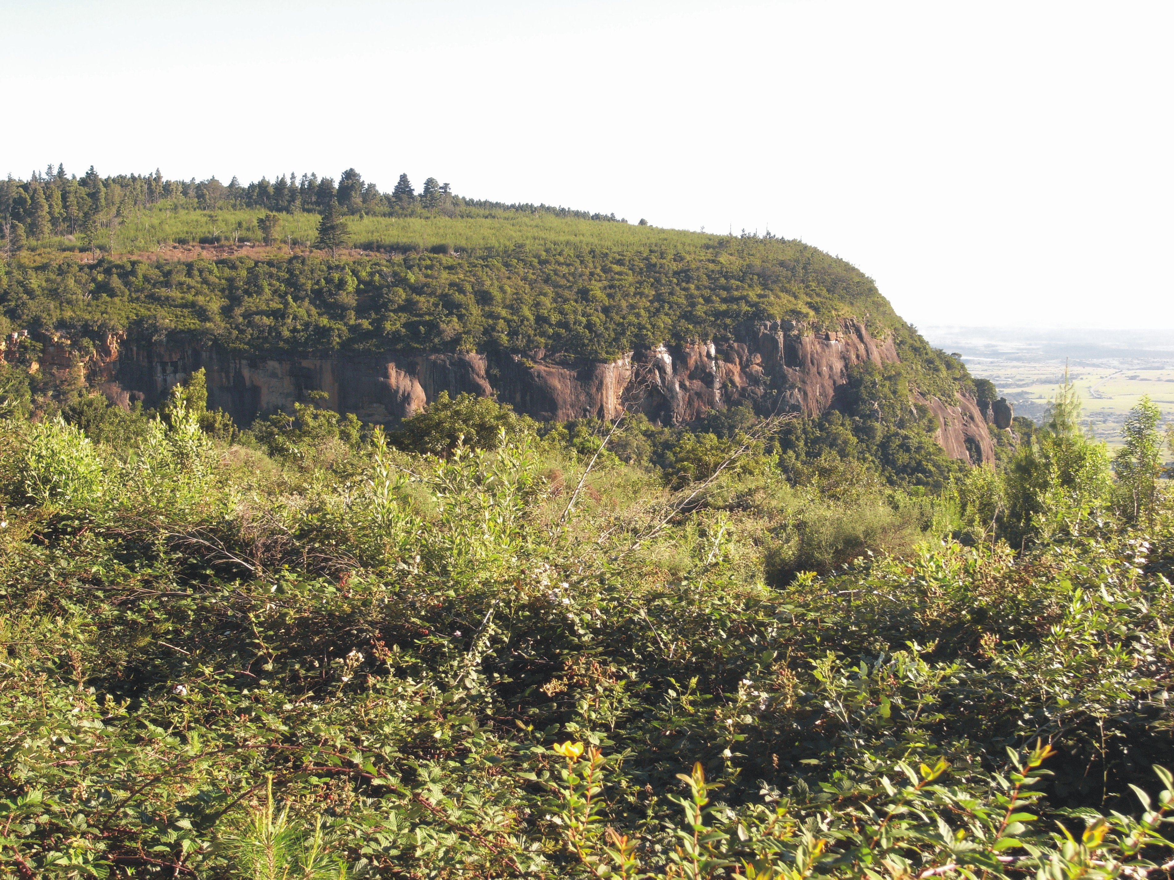 Amathole-Region, Höhenstufe am Tyhume-Tal (Eastern Cape, Südafrika)